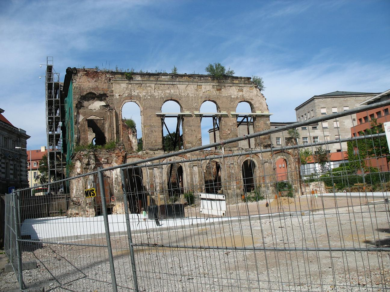 Ruin of the Kurländer Palais in Dresden